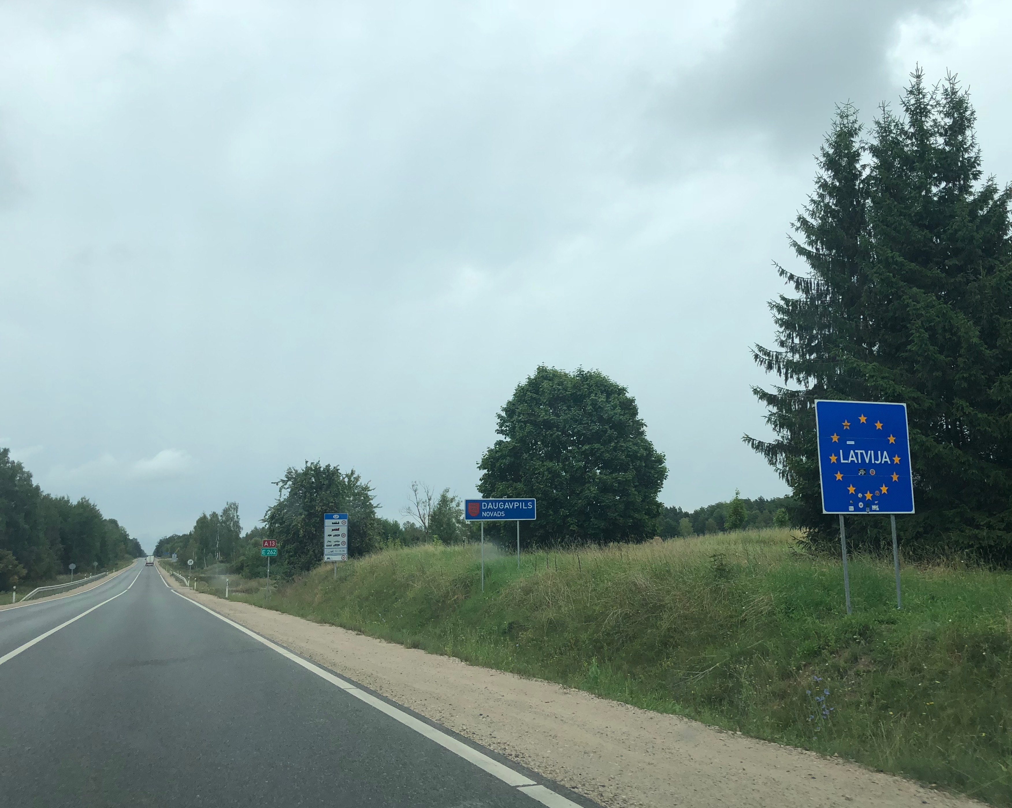 Даугавпилсский район. Граница с Литвой.